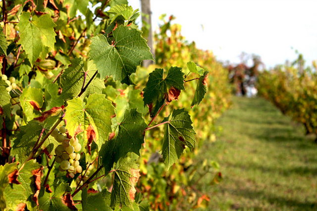 Avant les vendanges à Zielona Góra